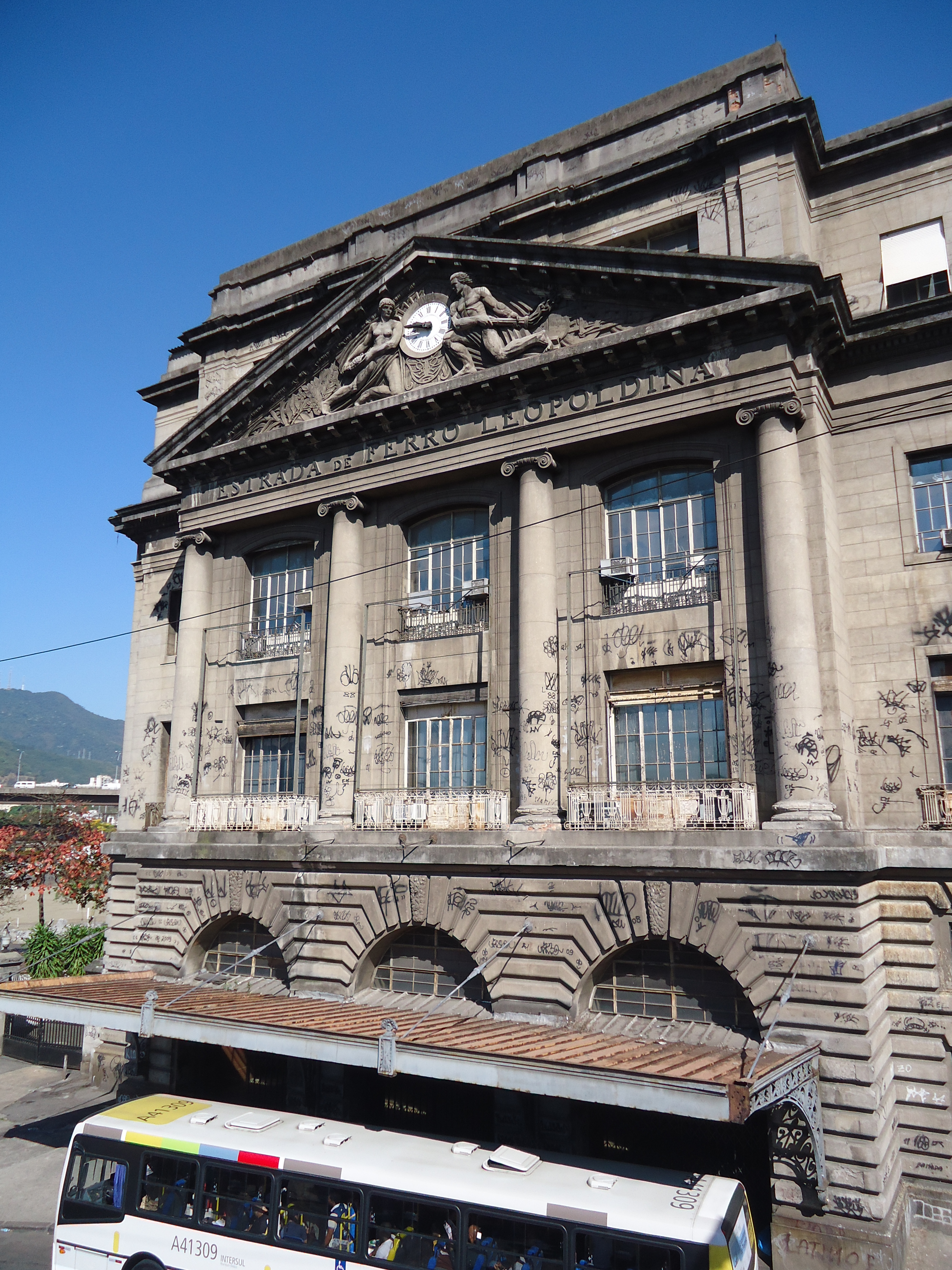 Estação Barão de Mauá da Estrada de Ferro Leopoldina, av. Francisco Bicalho, cidade e município do Rio de Janeiro, estado do Rio de Janeiro, Brasil: detalhe da fachada.